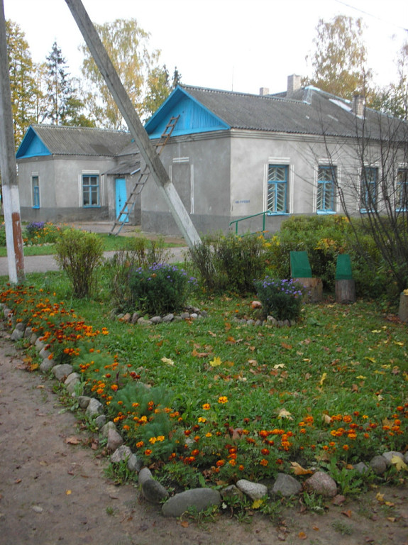 школа